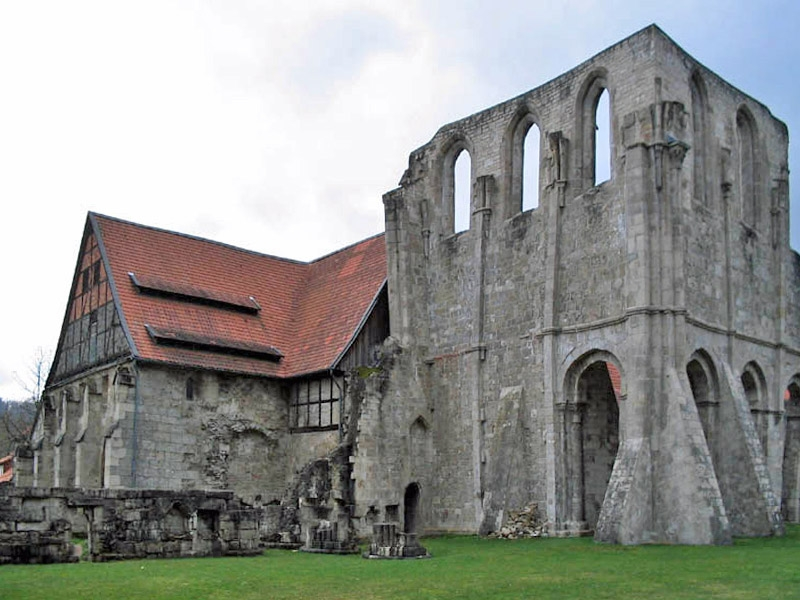 Klausurgebäude mit Kreuzgang und Kapitelsaal Klosterruine Walkenried